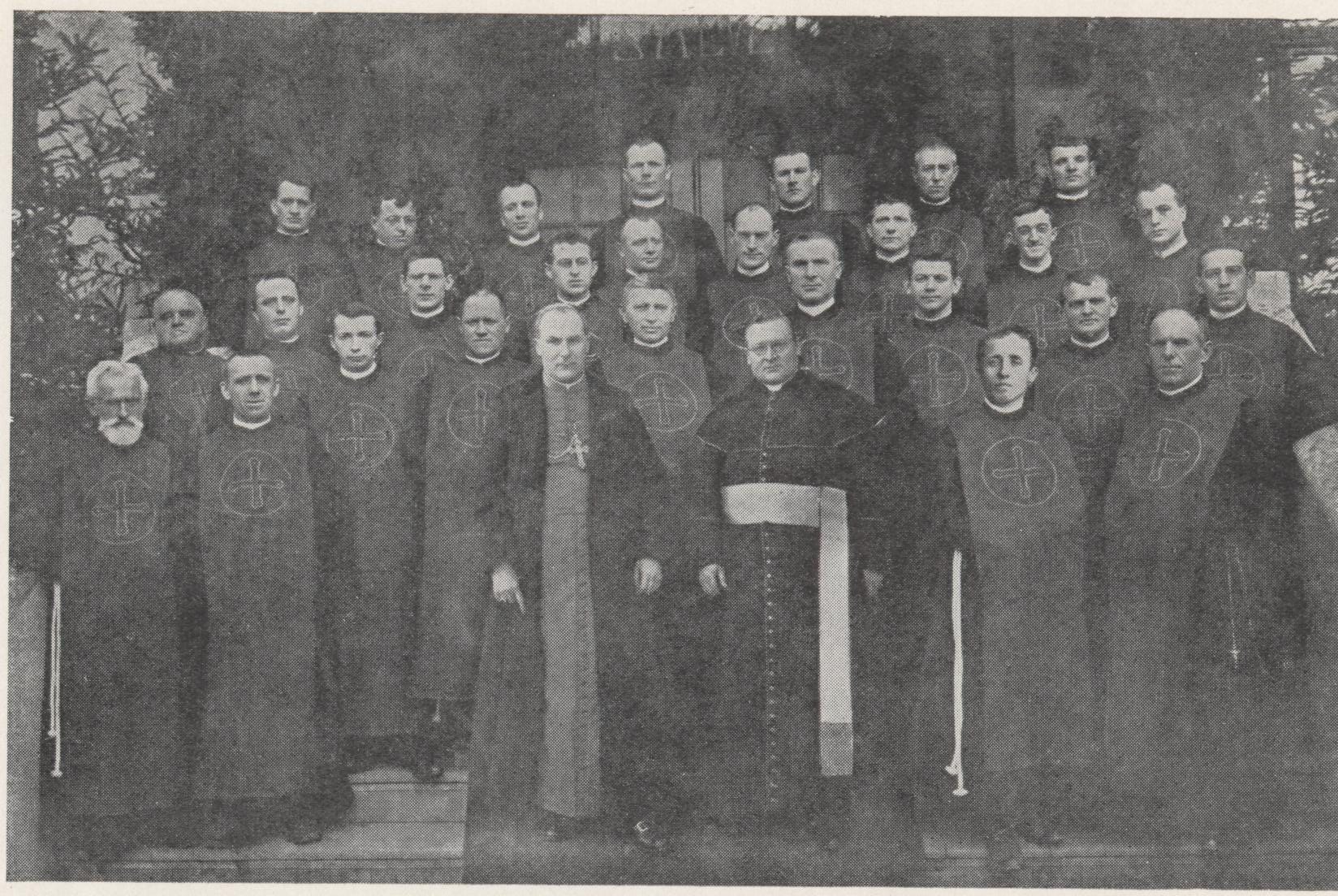 Prälat Jakob Bussereau mit seinen Paulusbrüdern 1914